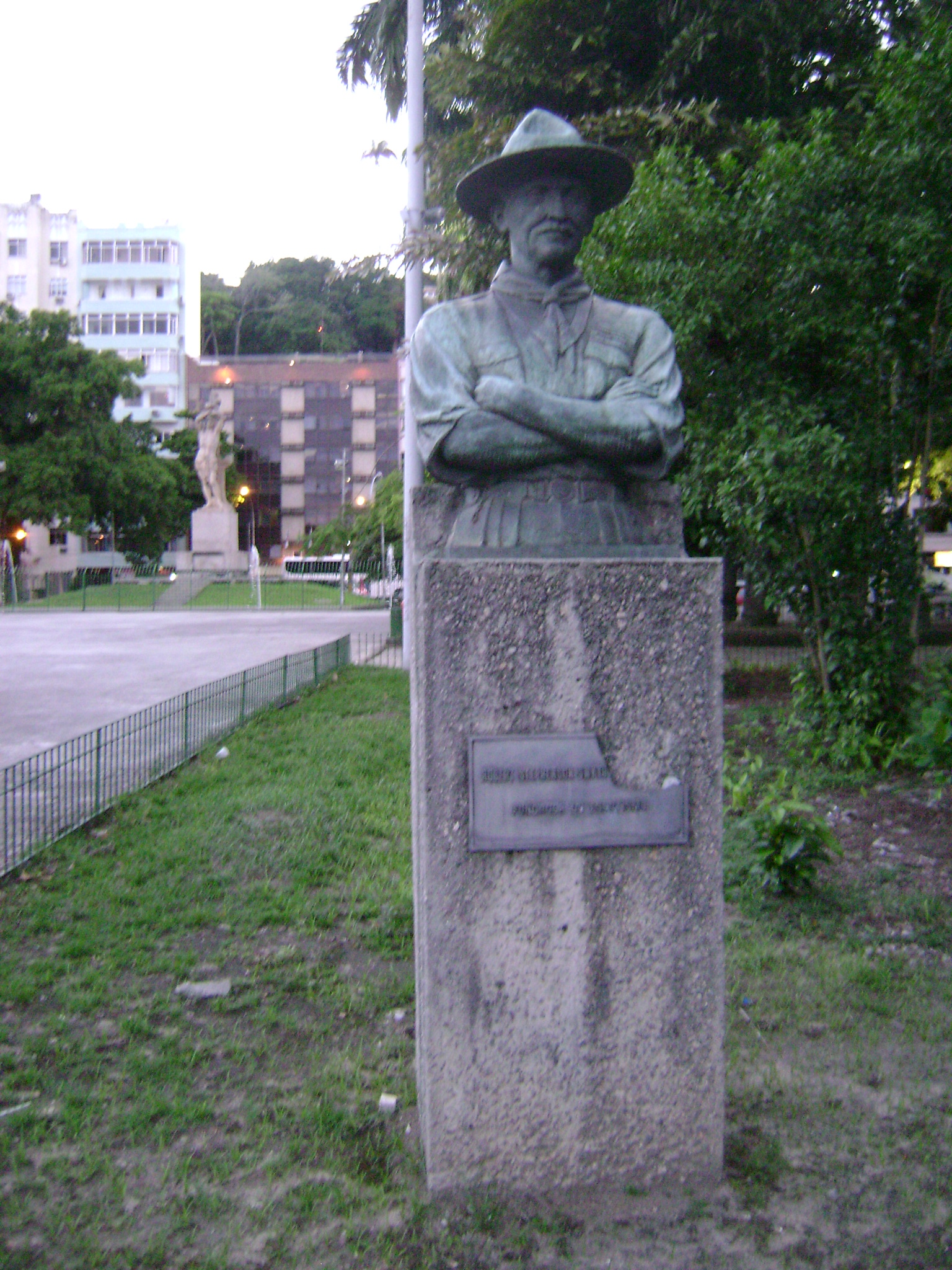 Estátua de Lord Robert Stephenson Smyth Baden-Powell, na cidade do Rio de Janeiro, Brasil.